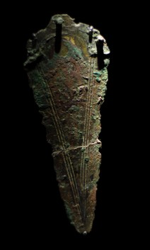 Ein Bronzedolch aus dem Fürstengrab von Leubingen. Exponat der Dauerausstellung im Landesmuseum Halle mit frdl. Genehmigung des Museums aufgenommen.